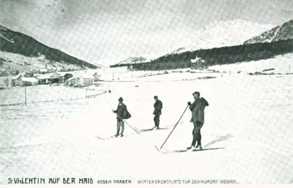 Skiläufer mit Einstockstil